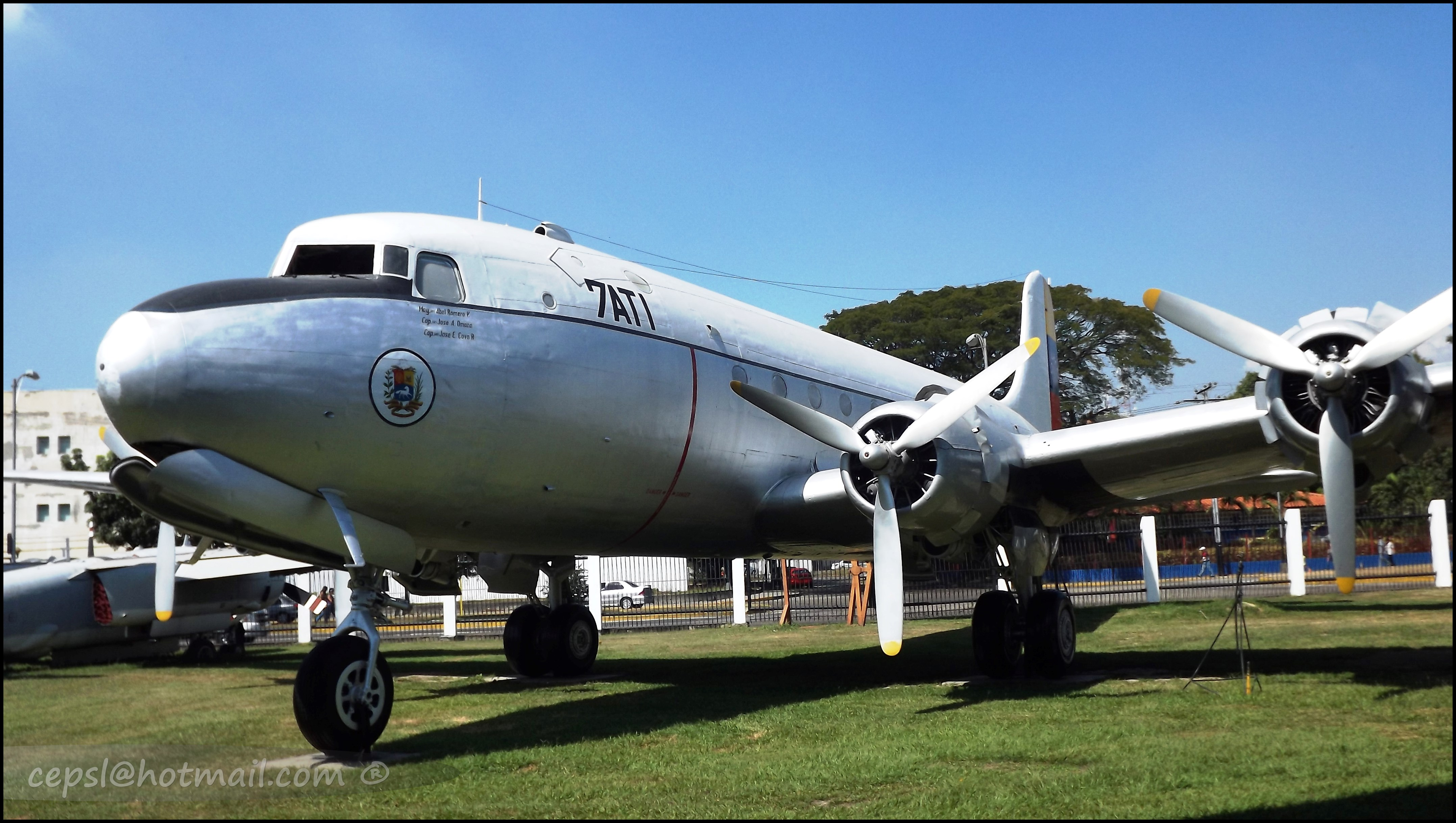 Douglas C-54 Skymaster (7AT1) La Vaca Sagrada, Avión presidencial de Marcos Pérez Jiménez presidente de Venezuela, en Enero del año 53 participó en los acontecimientos que sacudieron a Venezuela que derivaron en el golpe de estado que depuso al gobierno, fue esta aeronave en la que salió del país un grupo de militares que participaron en estos sucesos, días después fue en este mismo avión en el que presidente y su familia abandonaron el país tras su derrocamiento. Pero la verdadera historia de su apodo no proviene de estos sucesos sino de una anécdota entre el personal del Grupo al cual pertenecía en la FAV debido a que solo pocos pilotos y un reducido numero de Tecnicos y mecanicos de mantenimiento podían acercarse y volar en el, de ahí su Apodo de La Vaca Sagrada